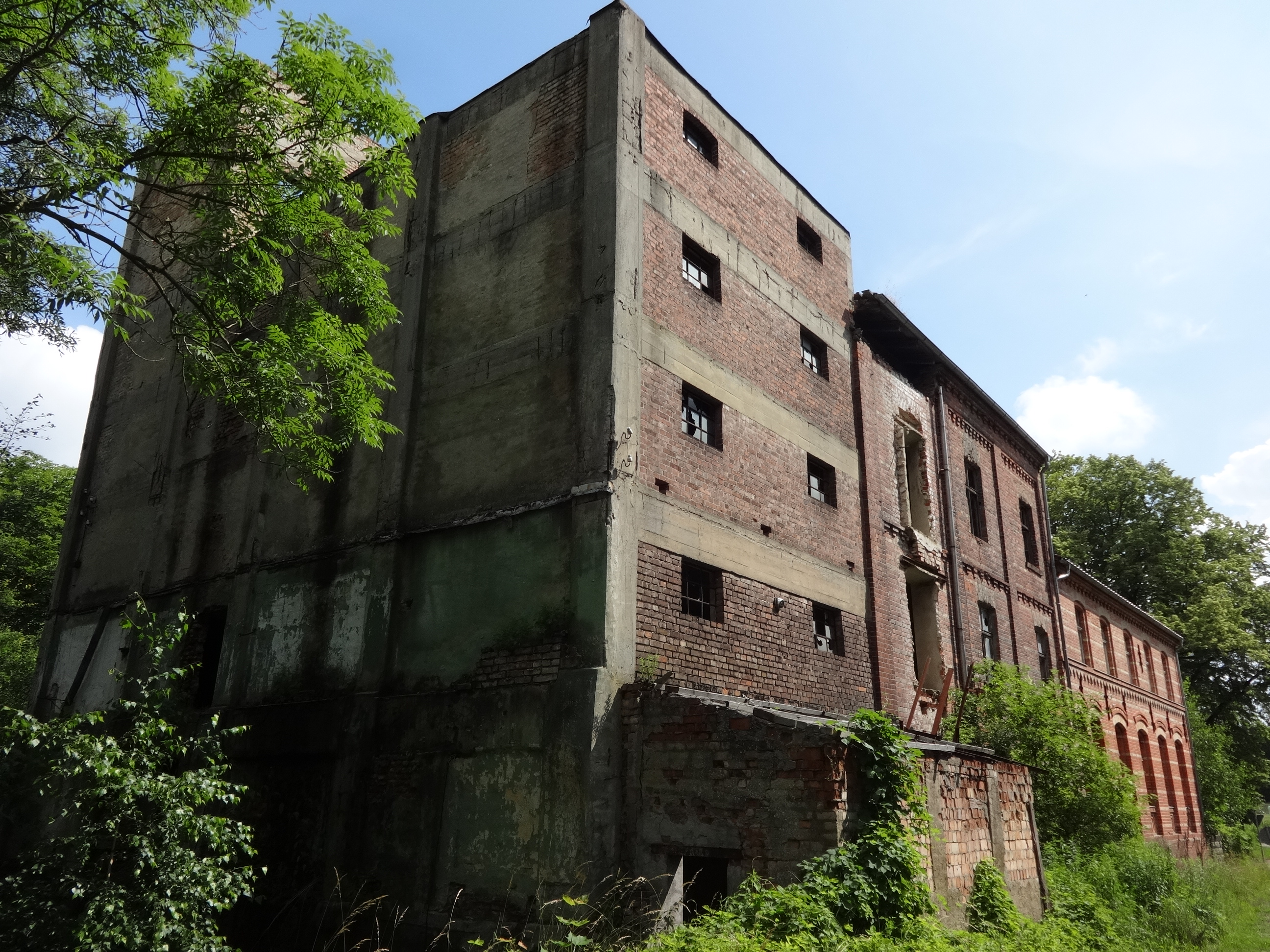 Denkmalgeschützte Wassermühle in der Dorfstraße 66 in Rietz-Neuendorf, Landkreis Dahme-Spreewald